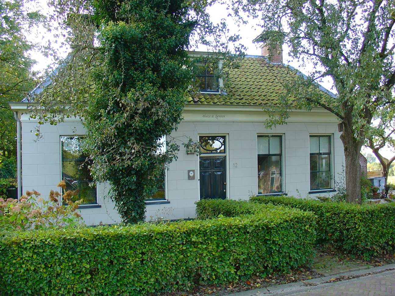 Huize te Lieveren in Lieveren)